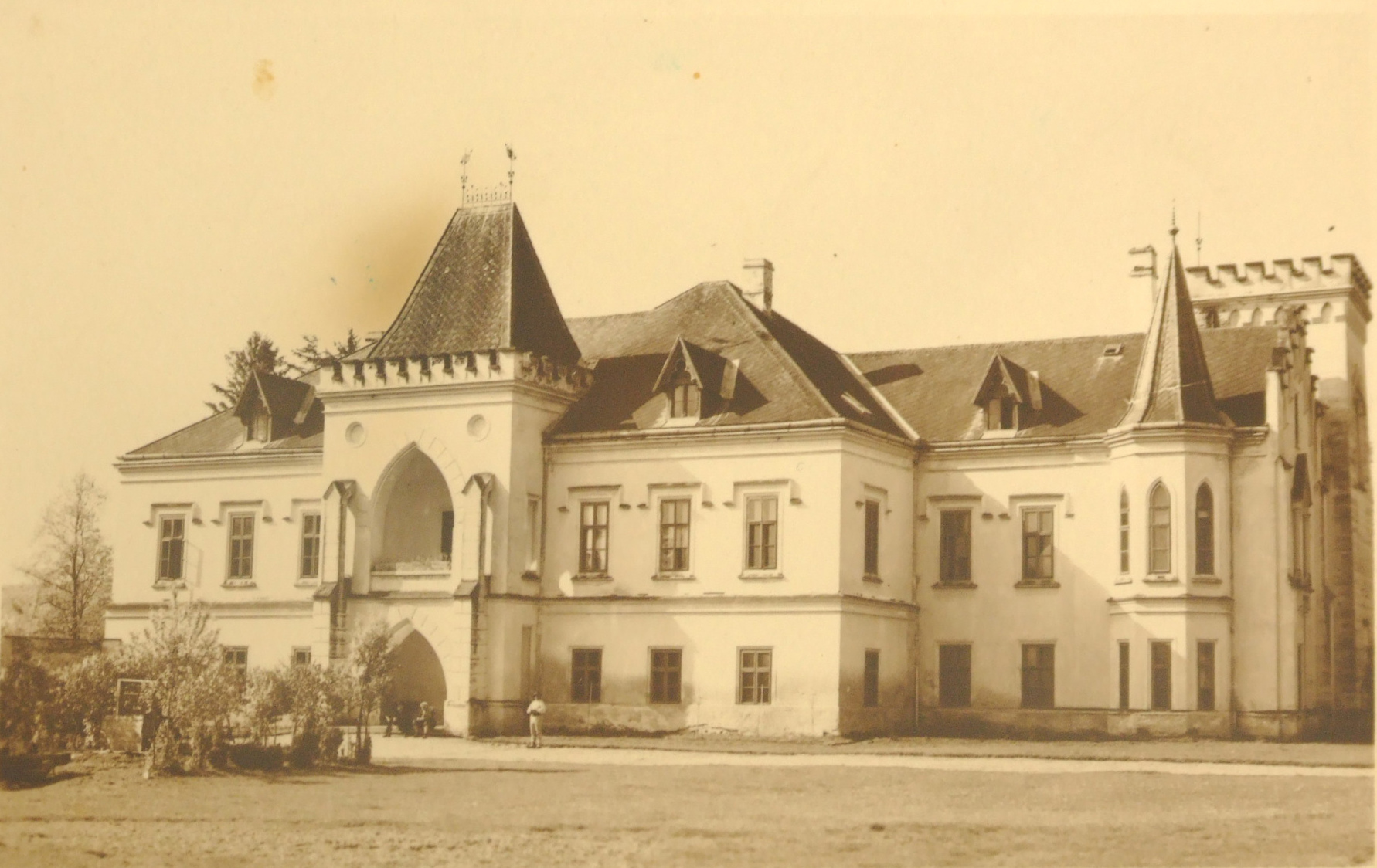 Castelul Nopcsa din Comuna Santamaria Orlea, satu Sacel. Imagine originala din 1926. 01